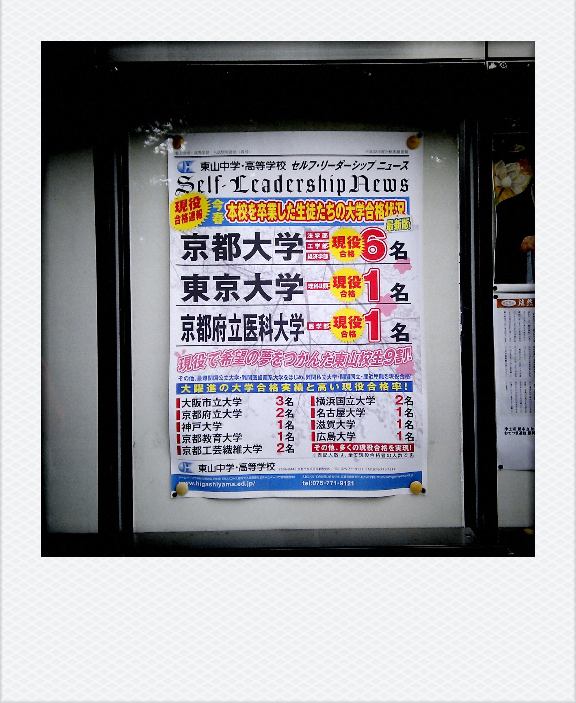 日本高中的廣告方式看來跟台灣差不多. 東山中学校・高等学校 京都大学 6, 東京大学 1, 京都府立医科大学 1, etc.